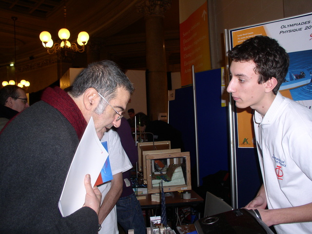 Serge Haroche, médaille d'or du CNRS, visite l'exposition en janvier 2010